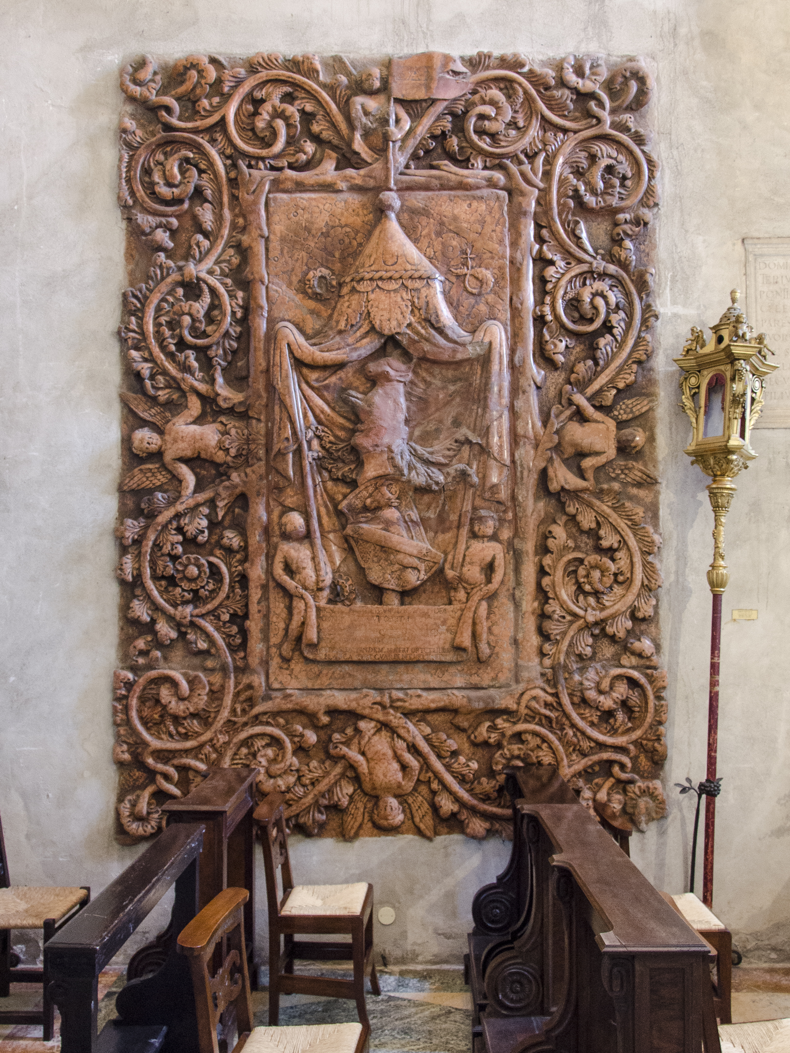 Chiesa di Sant'Eufemia - cappella di Santa Rita